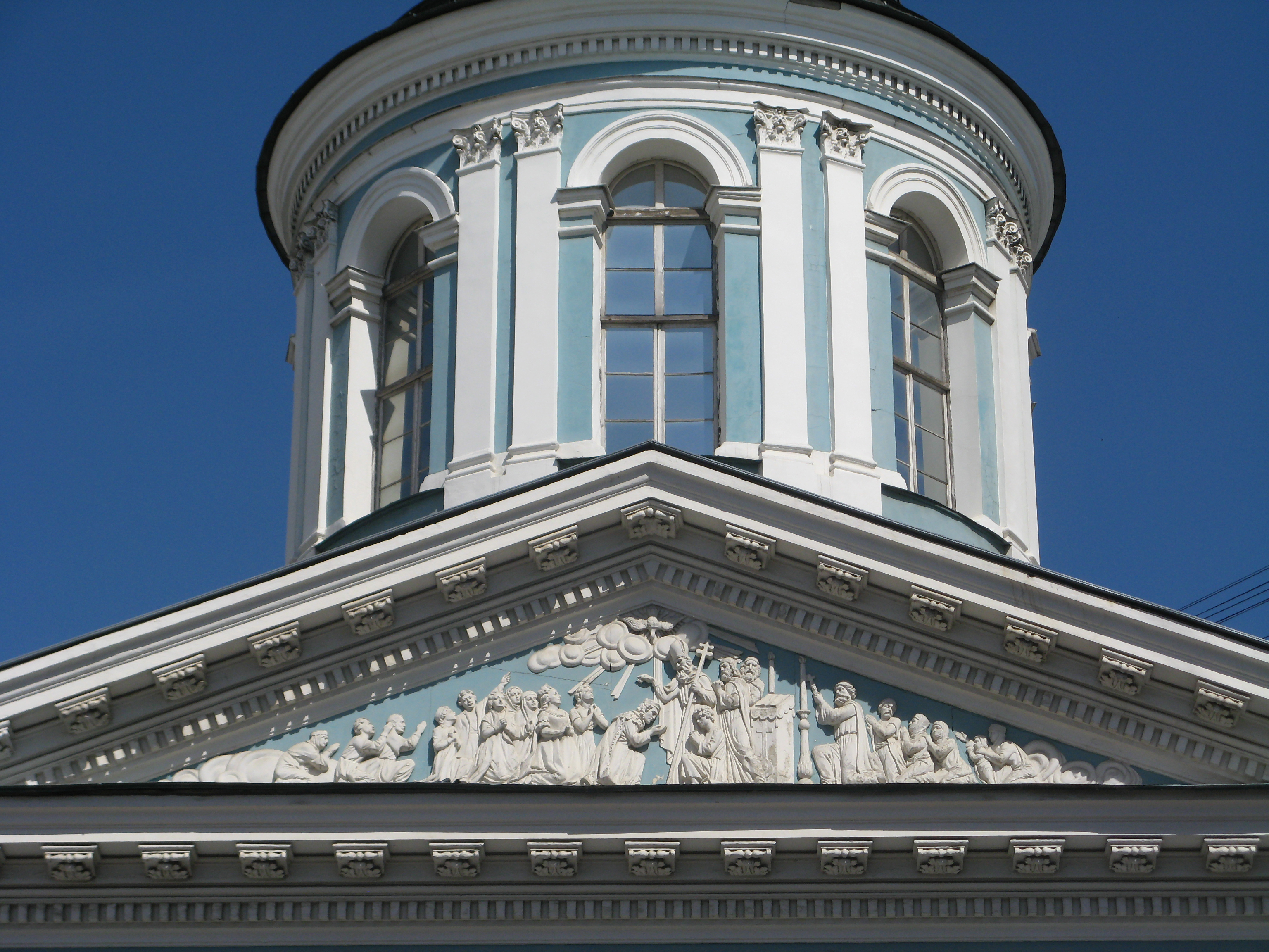 Армянская церковь Cвятой Екатерины: Невский проспект, 40, 42, Центральный район, Санкт-Петербург